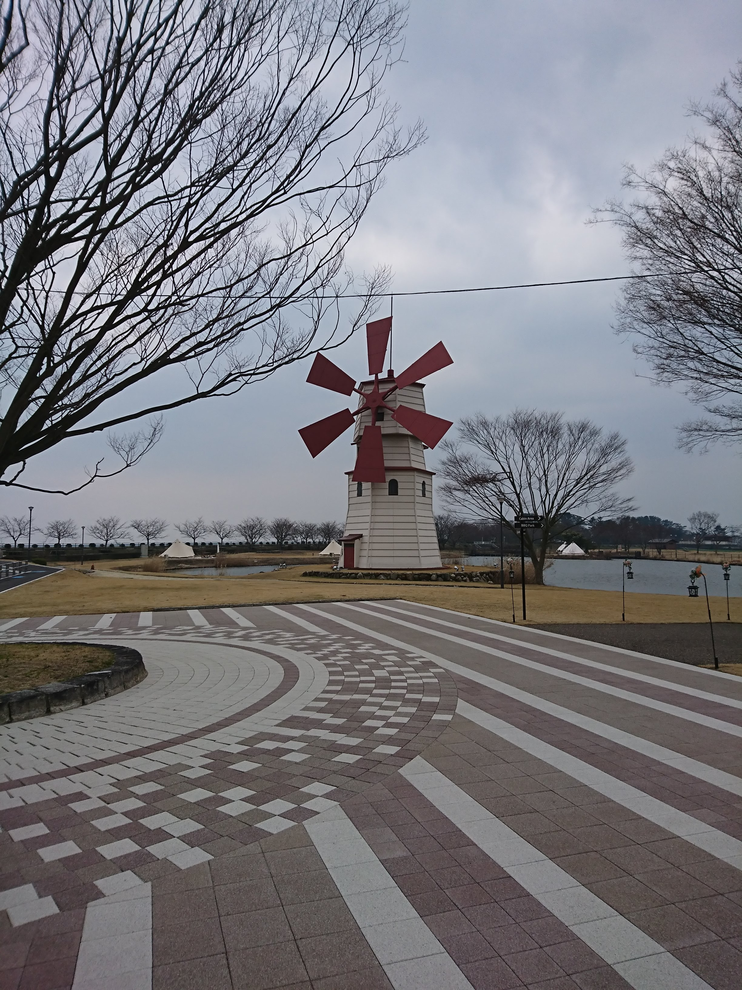 ステージクス高島の風車。羽根は固定されている。